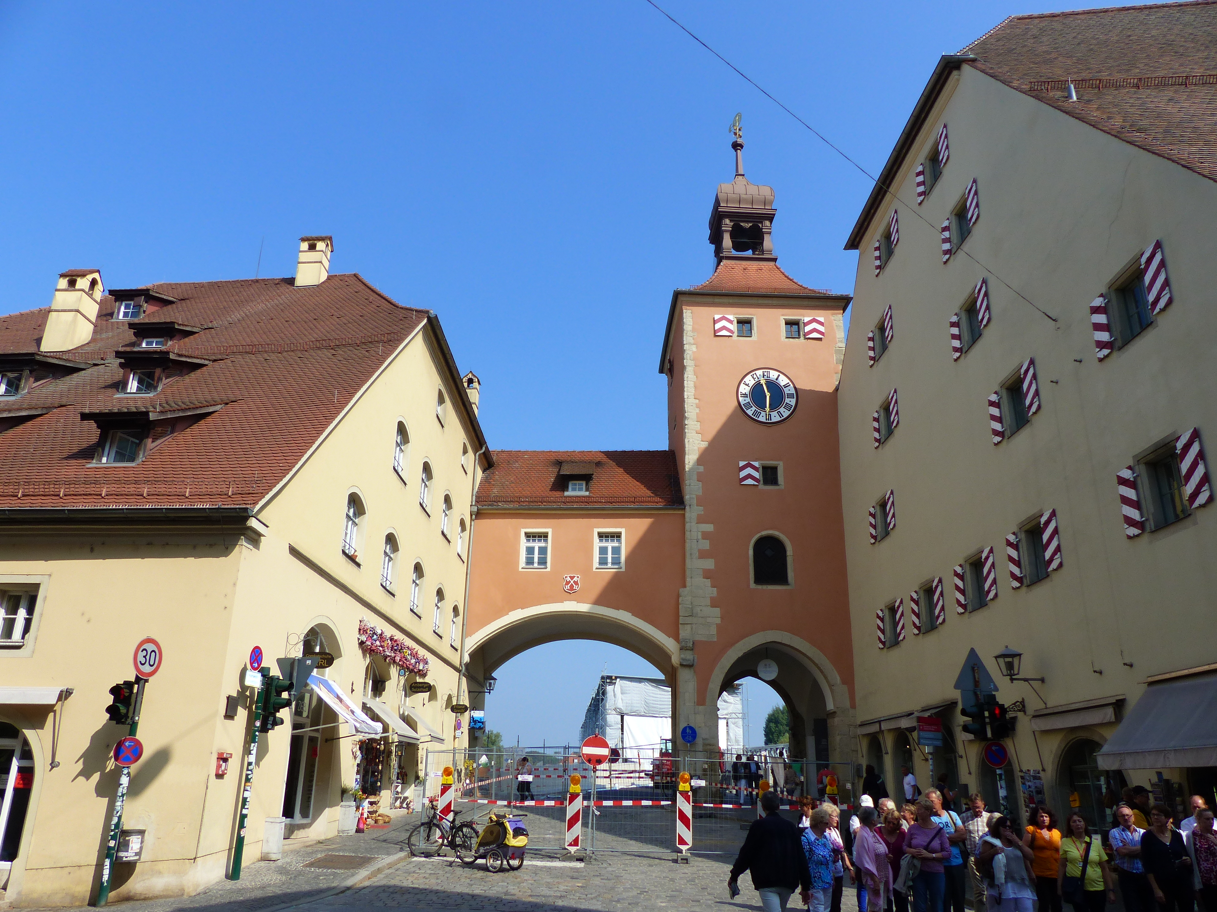 Brückturm in RegensburgThis is a photograph of an architectural monument.